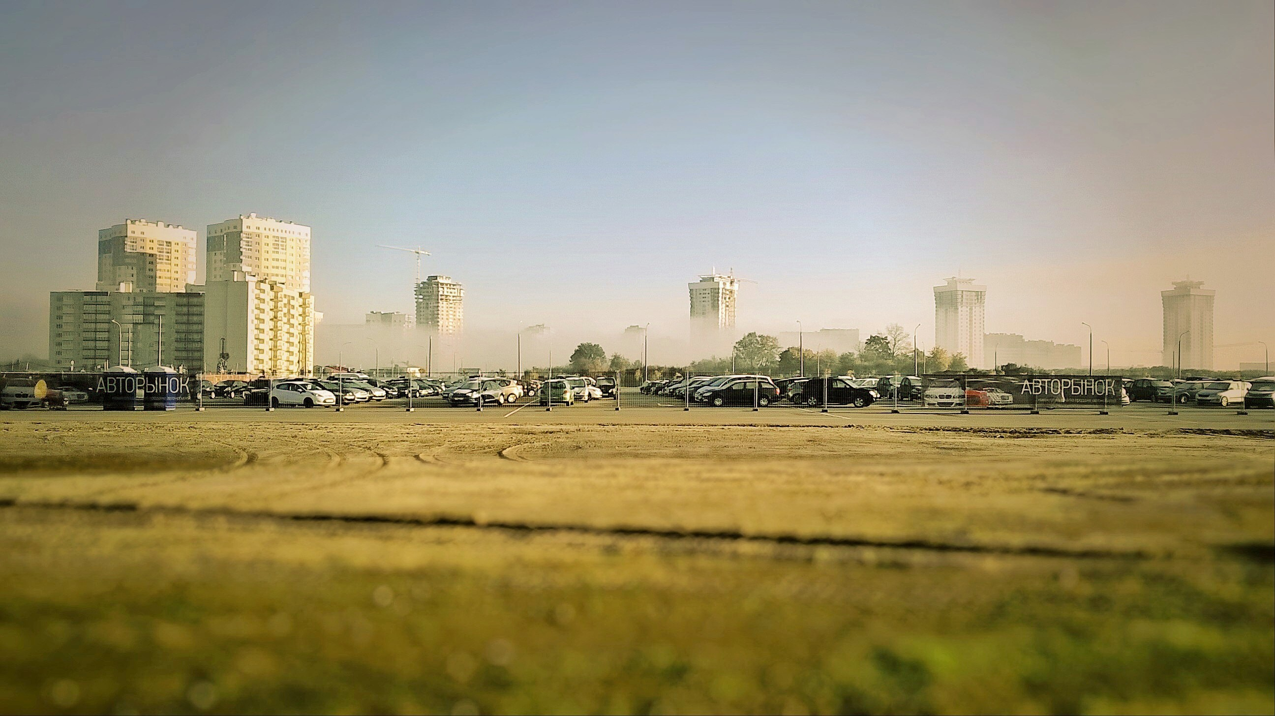 Туман, які ўзнік праз температурную інверсію.